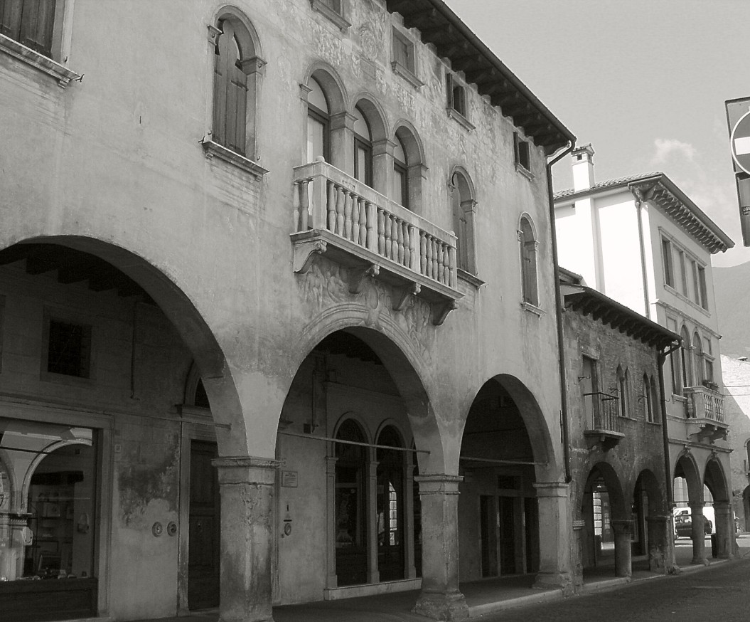 Serravalle di Vittorio Veneto (Treviso): Palazzo Brocca, Casa Sanfiori e Palazzo Pancetta "de Venetiis". Sony Cyber-shot DSC-T7